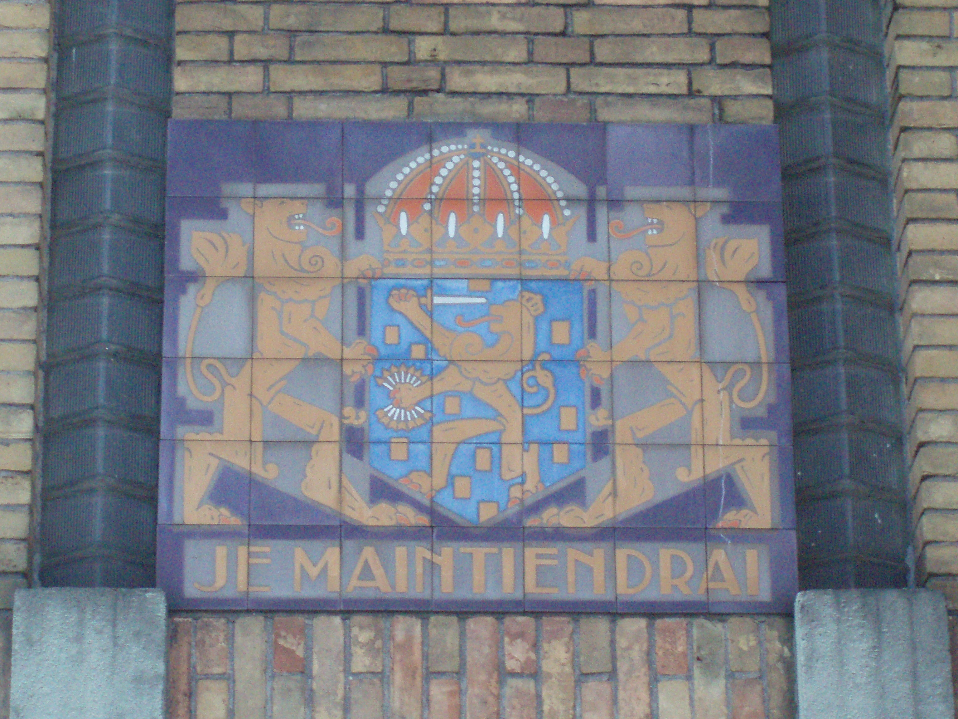 Wapen van Nederland in Art-Deco-stijl op de toren van de Marechausseekazerne aan de Meppelerstraatweg te Zwolle.